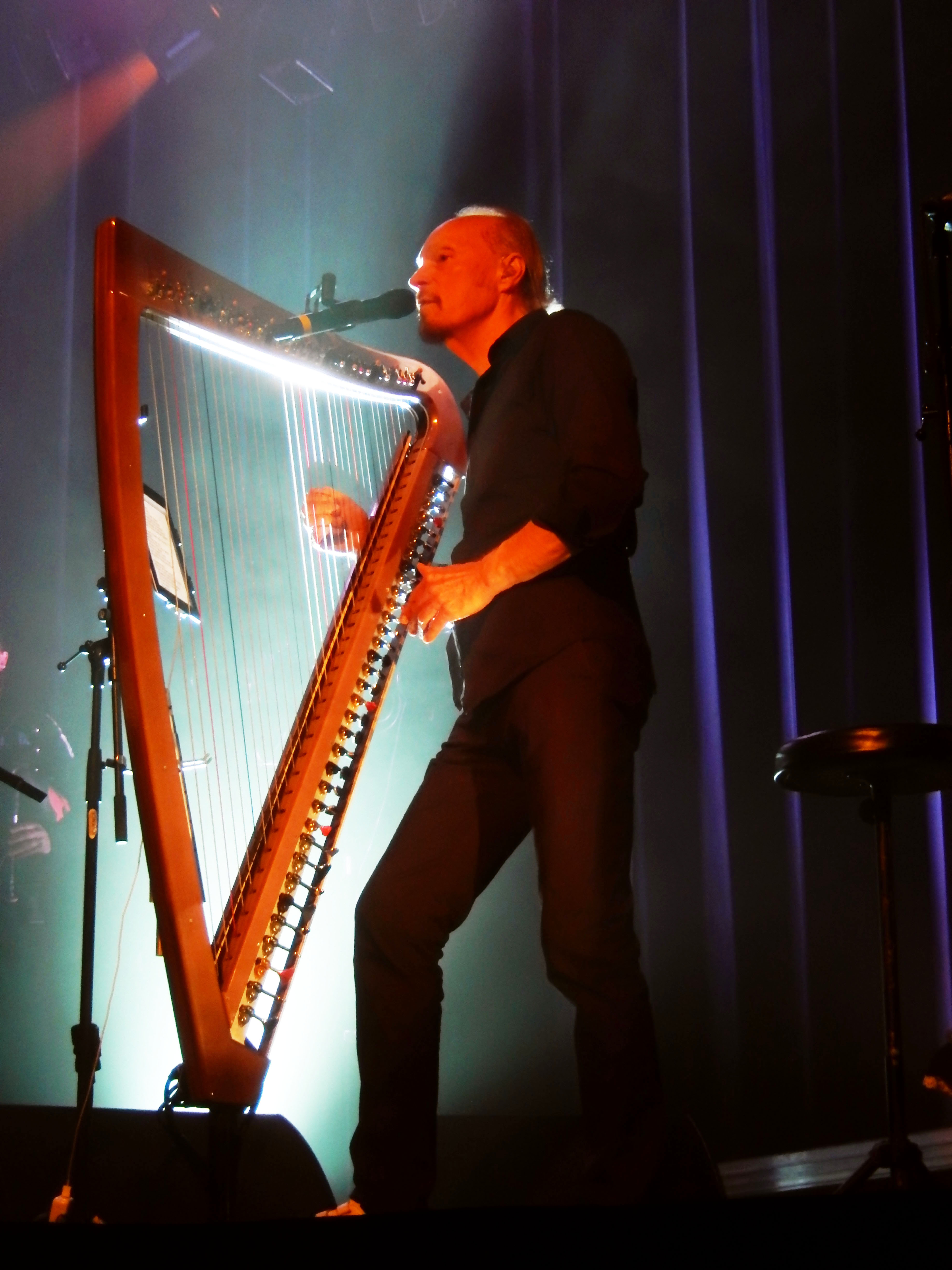 Photo originale pour Human ~ Kelt d'Alan Stivell.